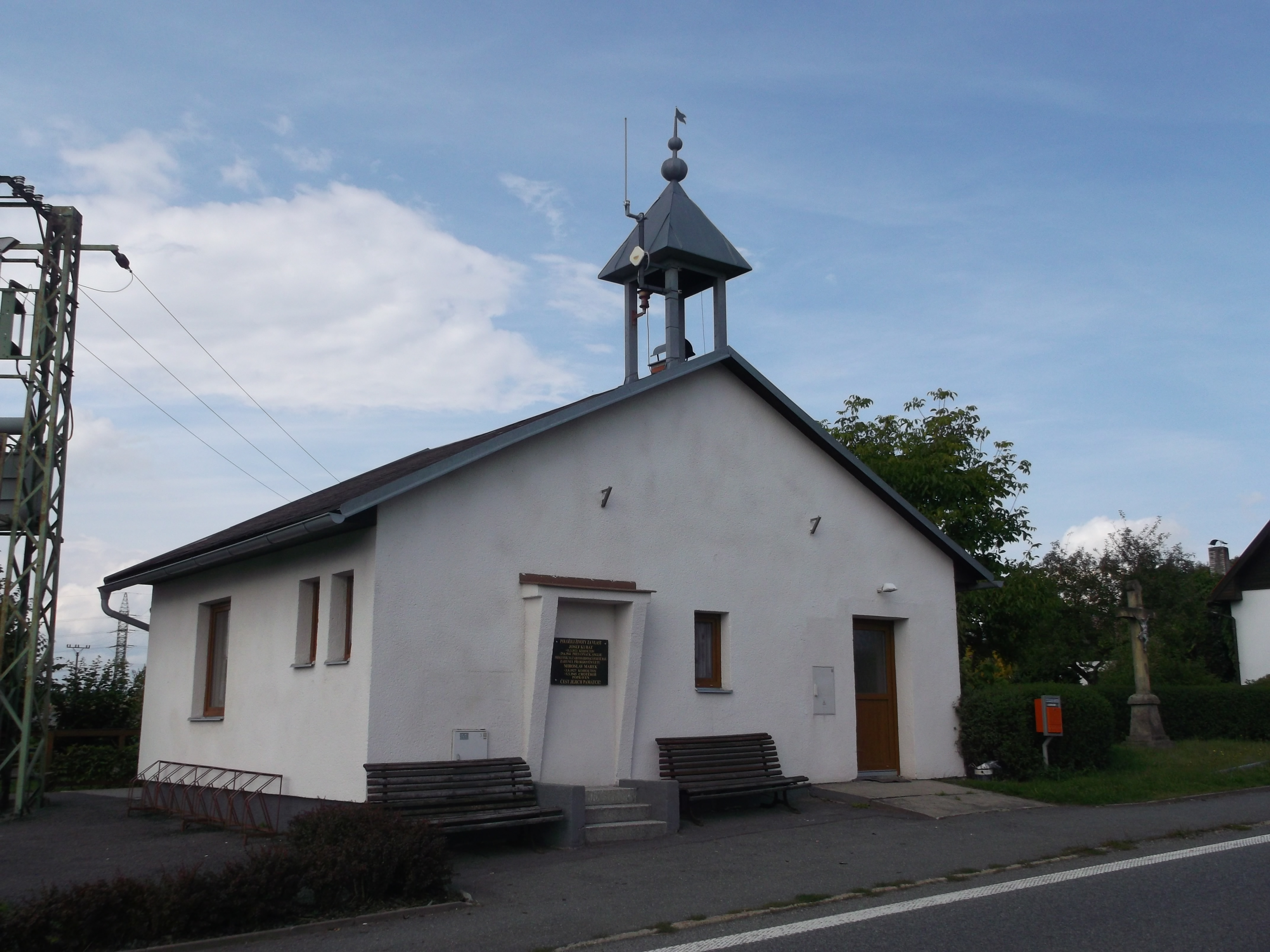 Kohoutov - spolková klubovna (býv. požární zbrojnice)